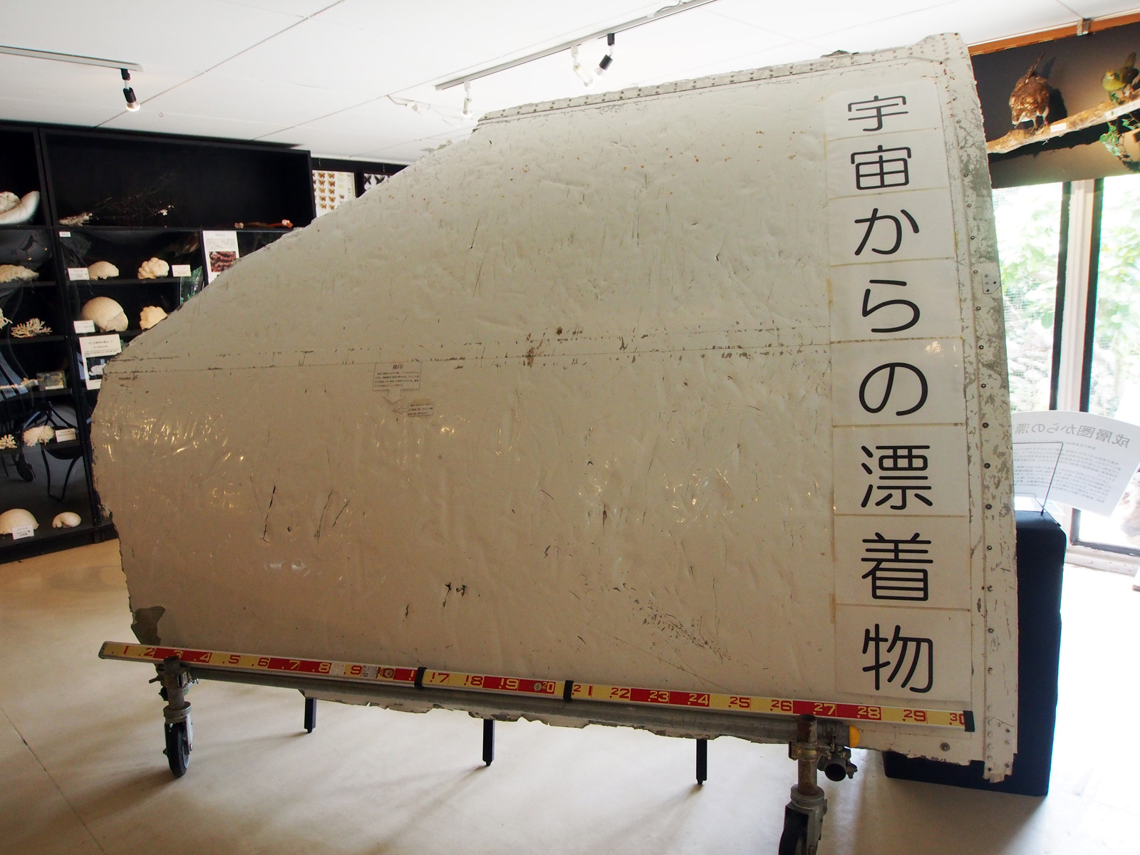 黒島研究所（沖縄県竹富町黒島）で展示されているH-IIAロケット11号機の衛星フェアリング